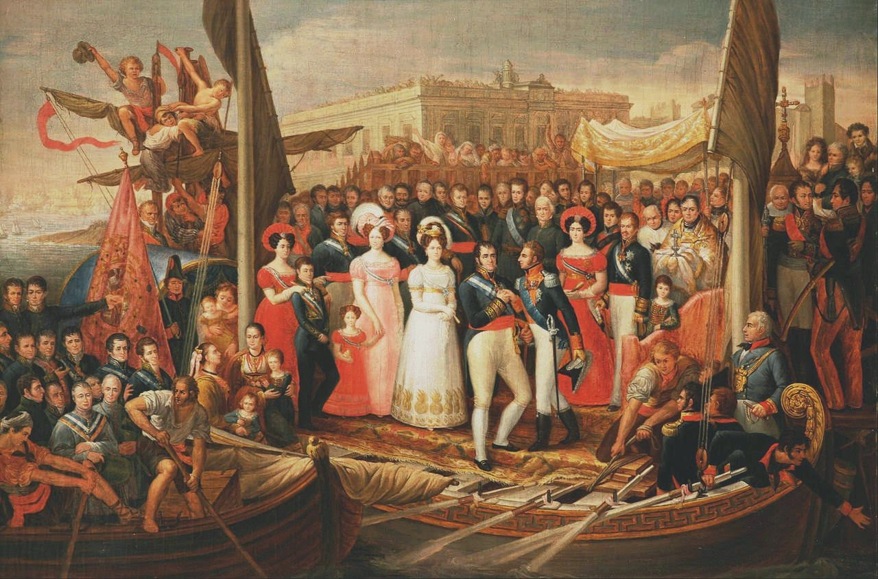 El lienozo representa el desembarco del rey Fernando VII de España (1784-1833), en el municipio de Puerto de Santa María, situado en la provincia de Cádiz, (España).